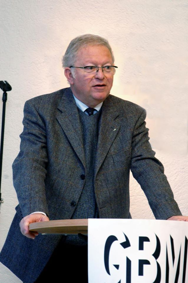 Wolfgang Richter bei einem Vortrag der GBM